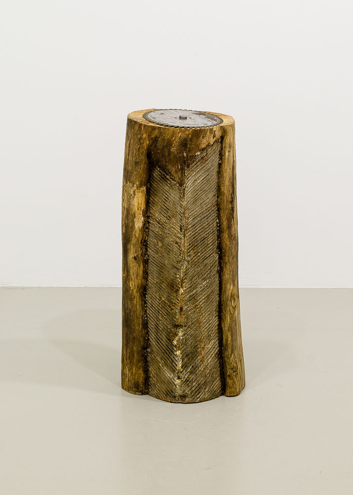 Heinz Baumueller: DIE KROENUNG. Hommage an Johannes Stuettgen, 2010 37 x 43 x 108 cm, Holz, Stahl / wood, steel